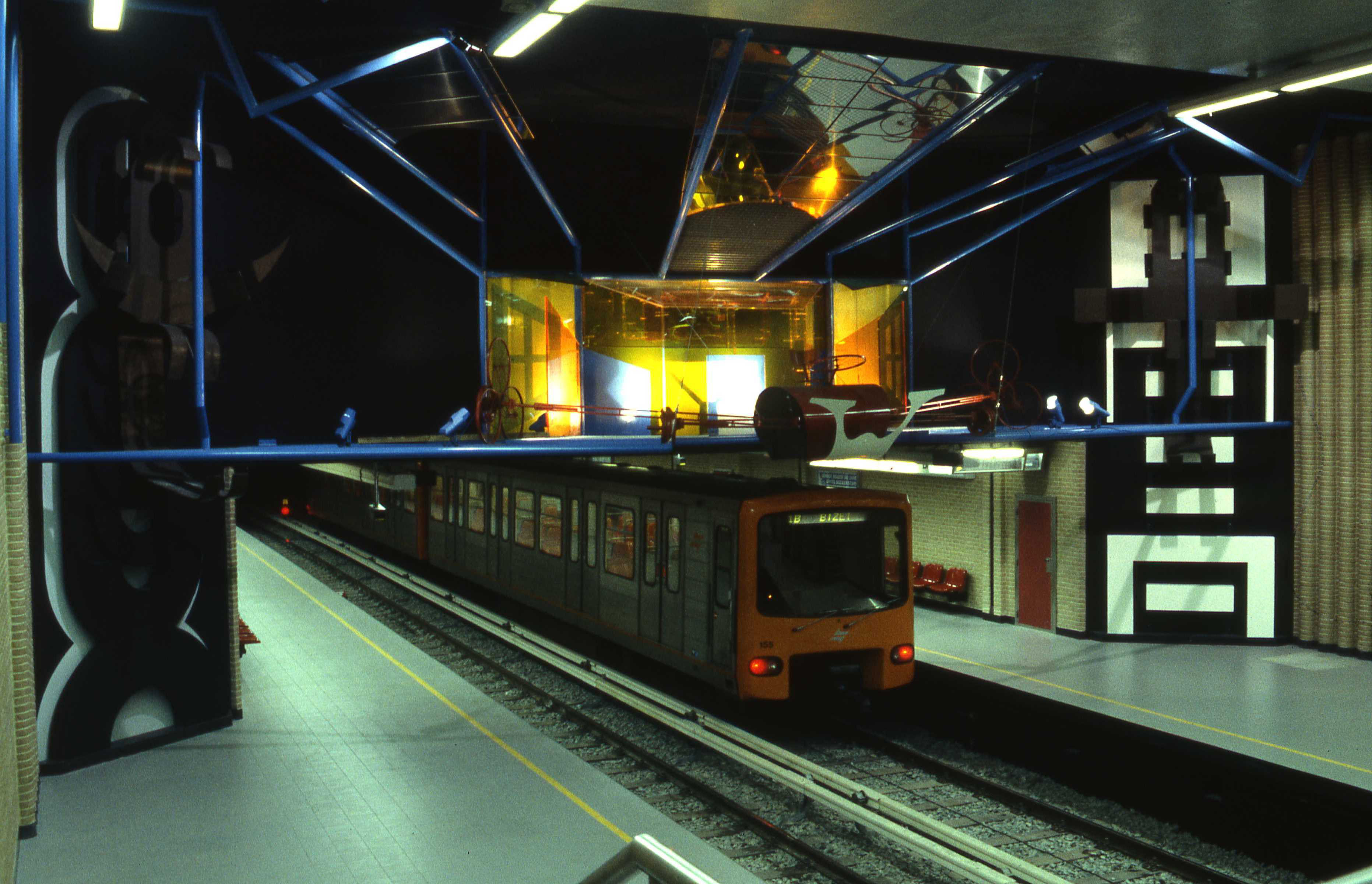 Kunstwerk bij het metrostation Bizet